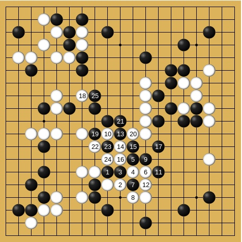 75-99手 220手完黒9目半勝ち